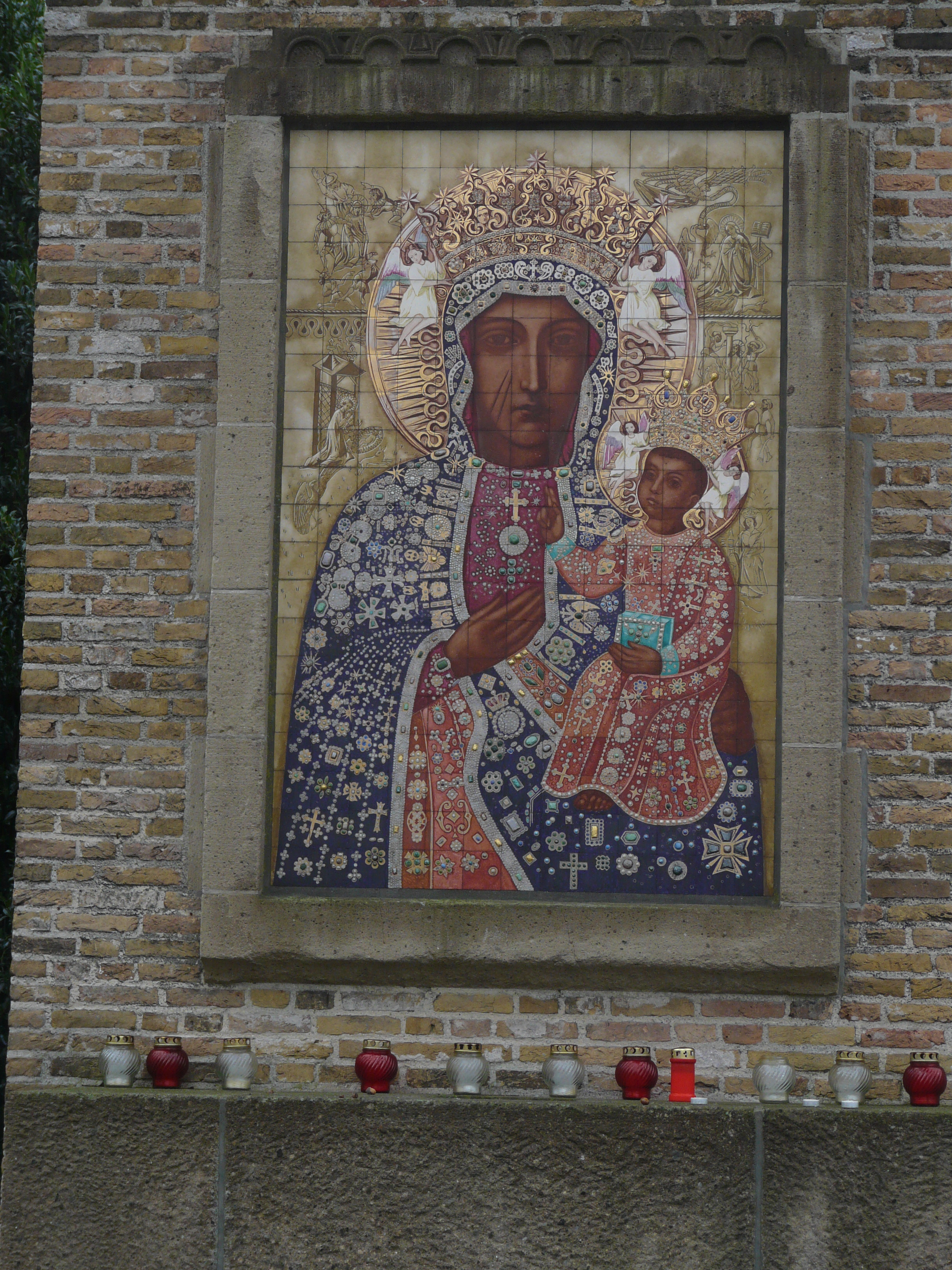 Zicht op een detail van de Poolse Madonna in de Maria Kapel ook wel de Poolse Kapel genoemd. Gelegen in een plantsoen nabij de Lovensestraat en de Wilhelminasingel in Breda. Niet ver van de grote doorgaande weg de Claudius Prinsenlaan en het centrum van Breda